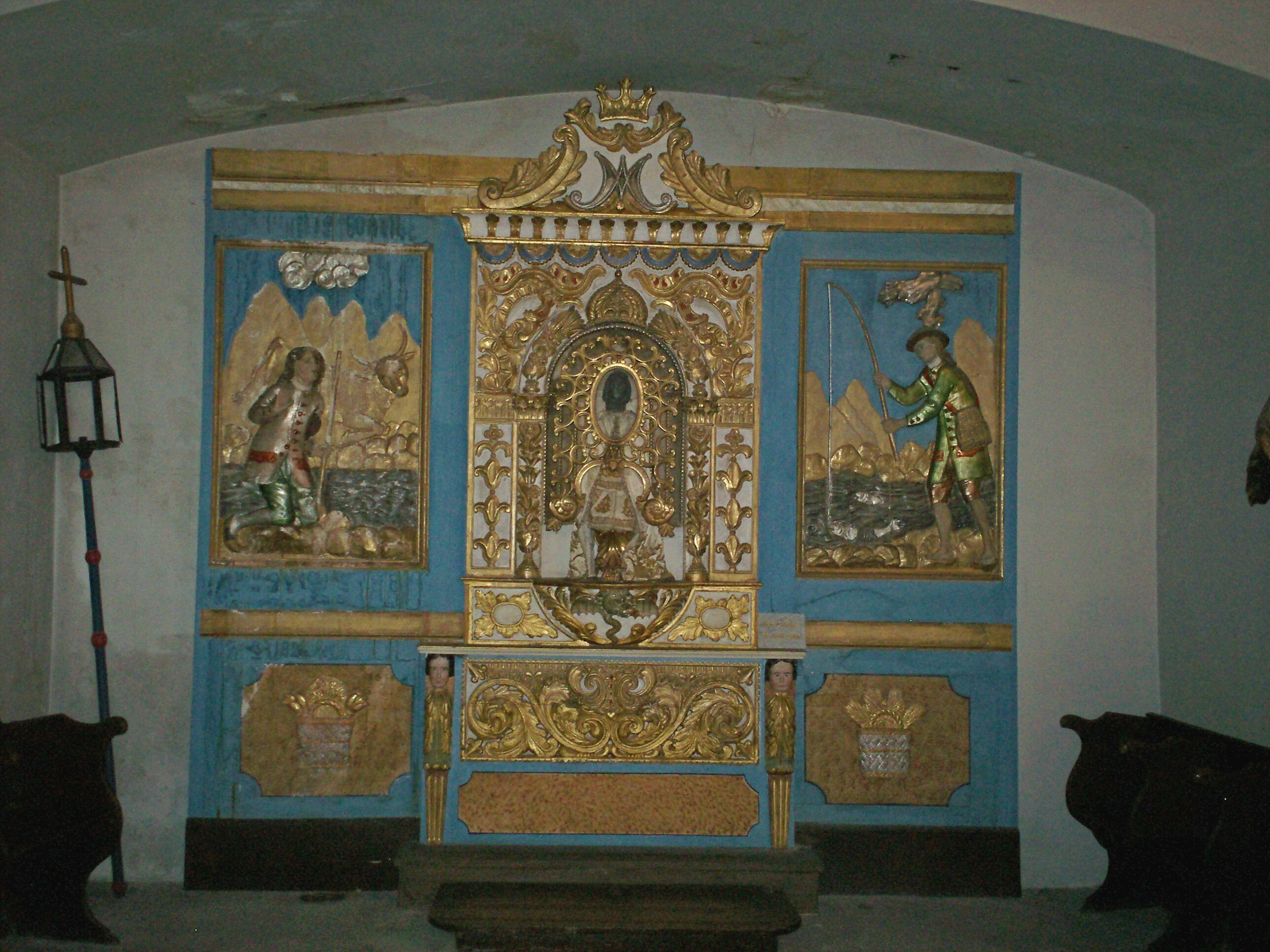 Capera Sent Martin.